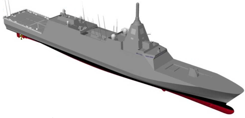 平成３０年度以降の護衛艦（新艦艇）について、三菱重工業による提案図。